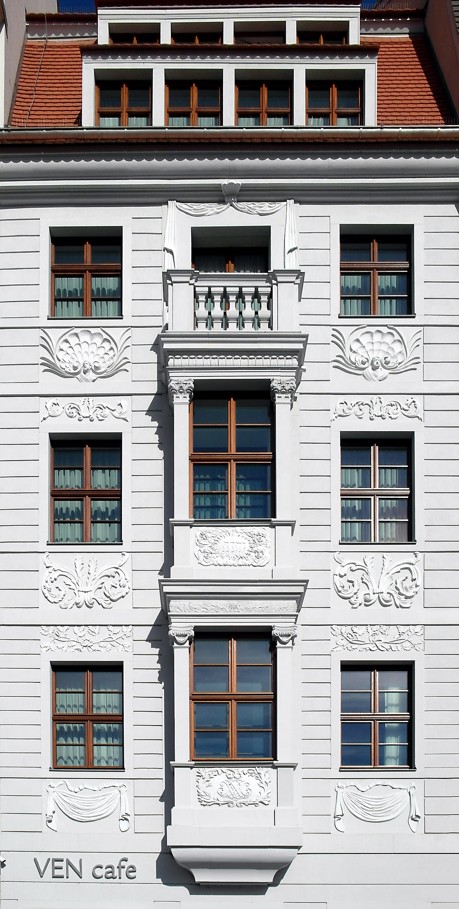 18.10.2012 01067 Dresden (Neumarkt): Rampische Straße 9 (GMP: 51.051528,13.743037). Ursprüngl. Barockbau (1680/90.) verm. von Johann Georg Starcke; 2008/09 wiedererrichtet. [SAM2420.JPG]20121018280DR.JPG(c)Blobelt